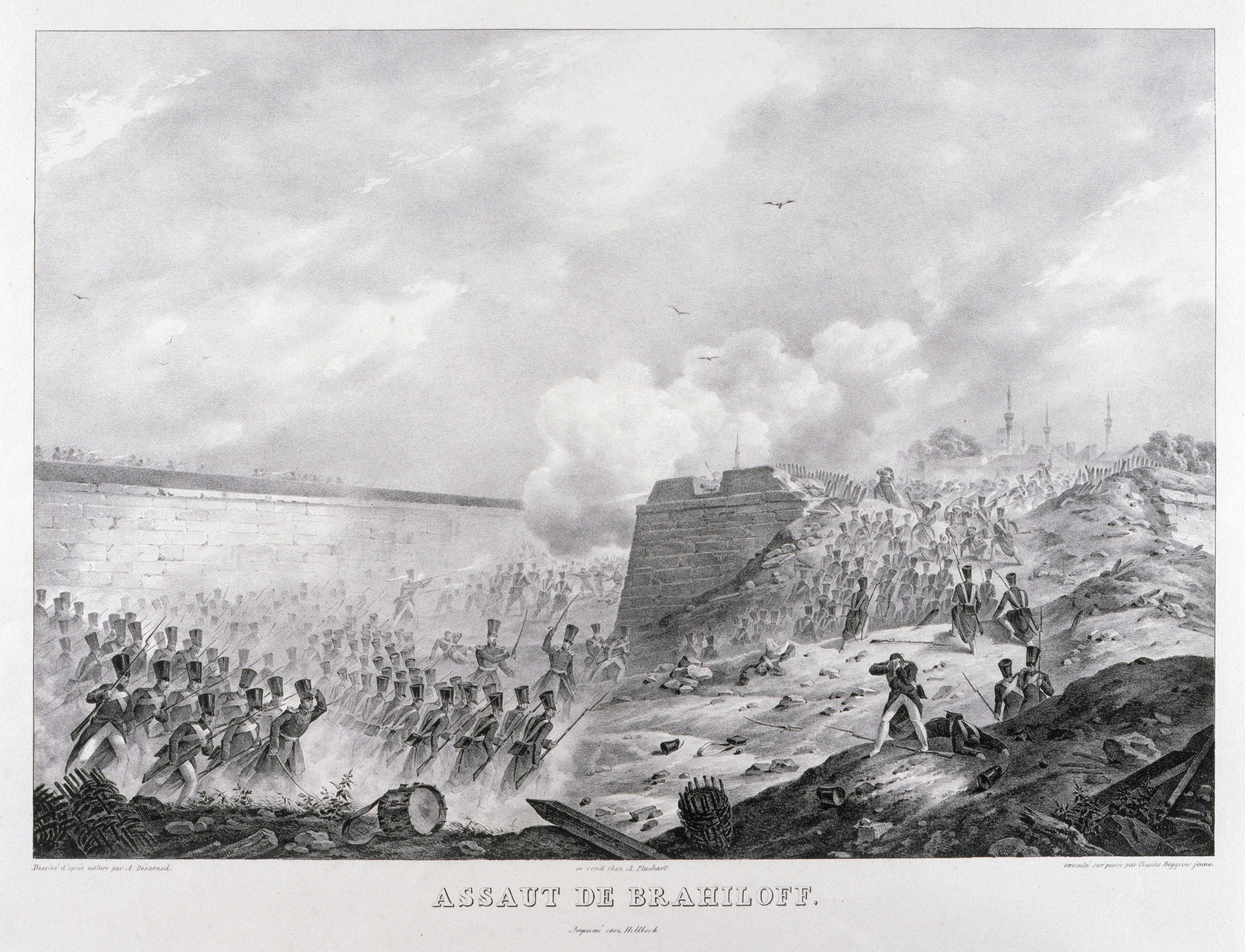 Взятие русскими войсками Браилова 1828 год